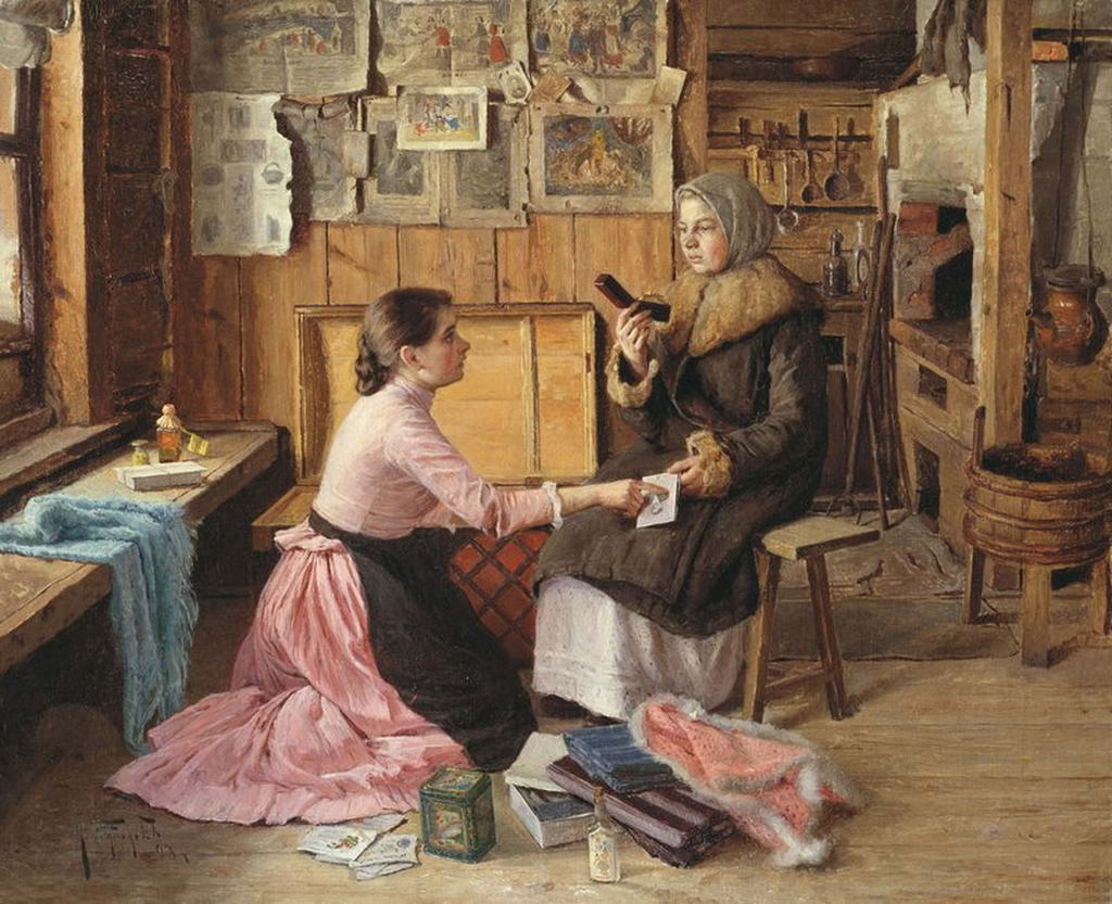 «Жанровая сцена. Разговор у сундука». 1893. Холст, масло.